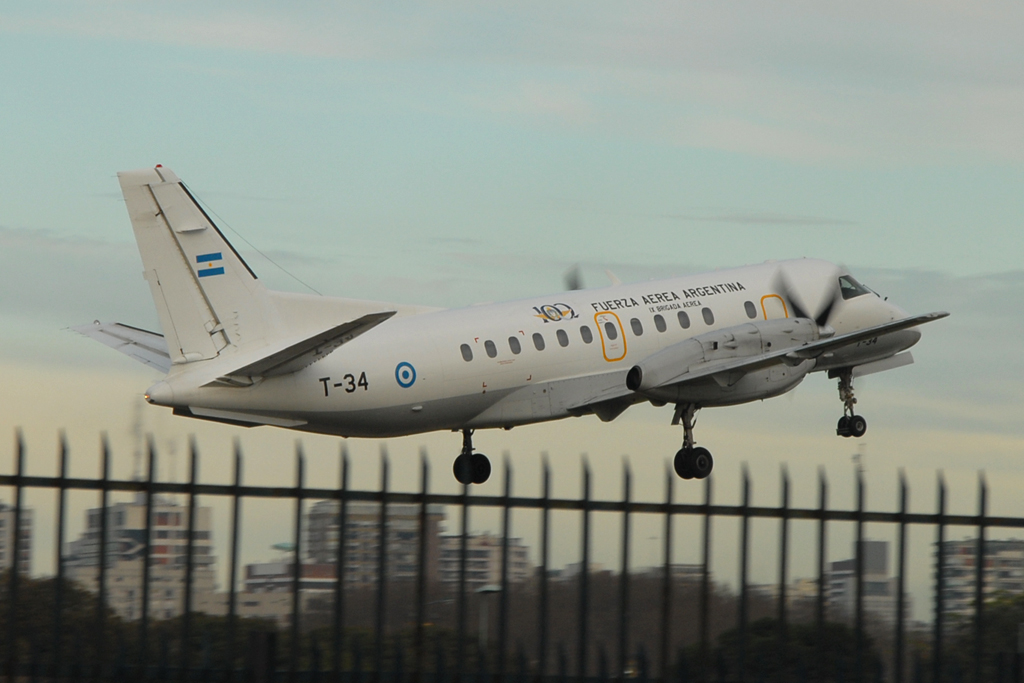 T-34@AEP 11AUG14